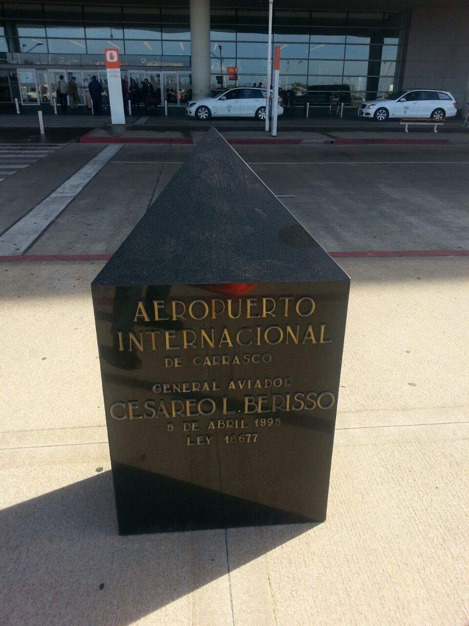 Monilito en honor a Cesáreo L. Berisso, pionero de la aviación en Uruguay, en el Aeropuerto Internacional de Carrasco